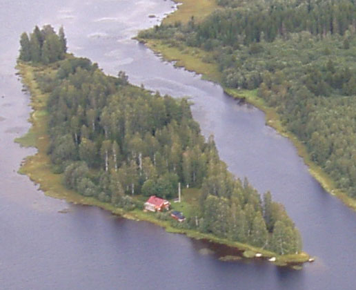 Nötholmen, Hedemora, Sweden